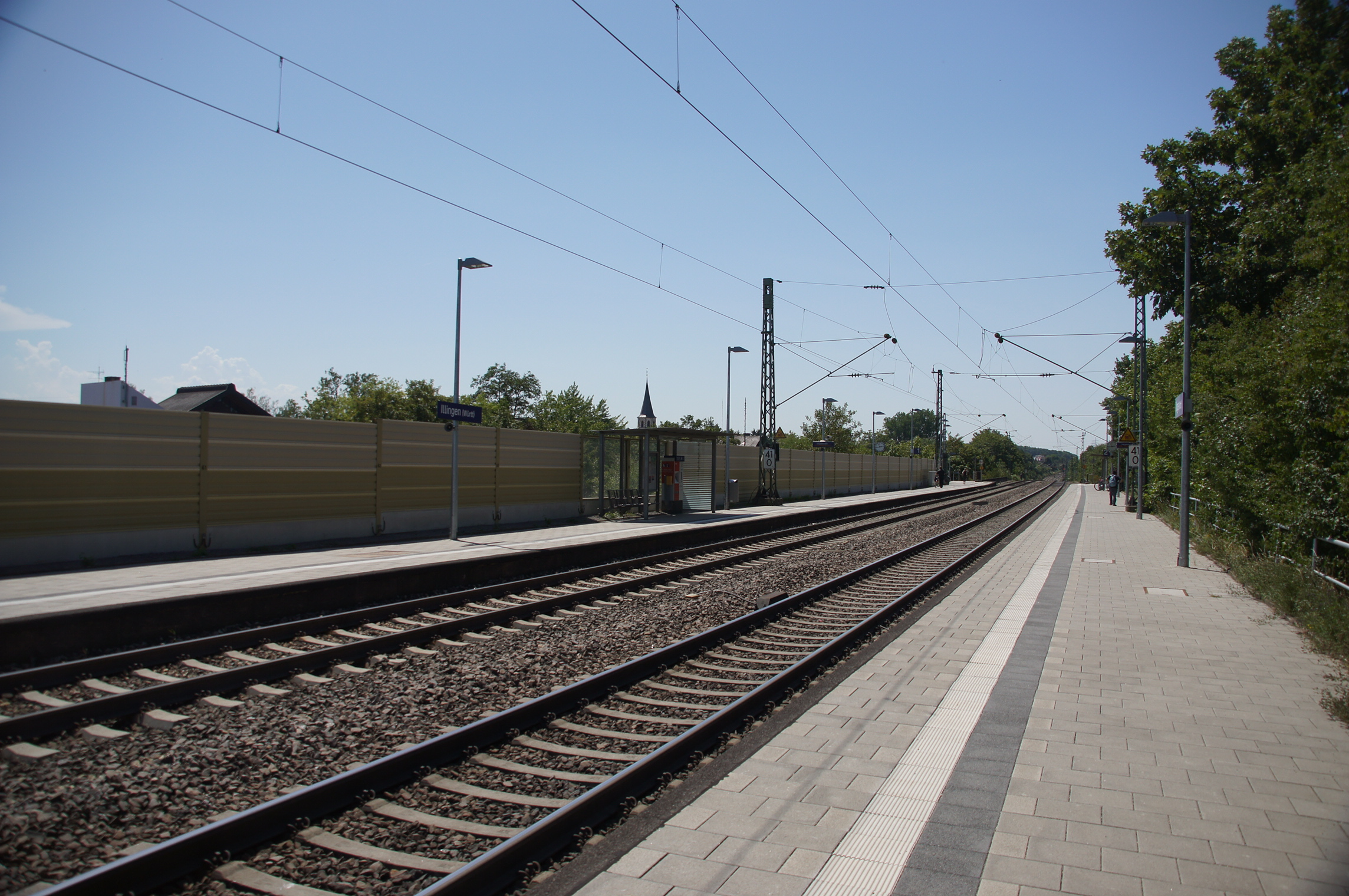 Bahnhof Illingen